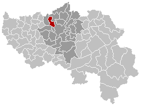 Gemeentekaart Ans, eigen werk